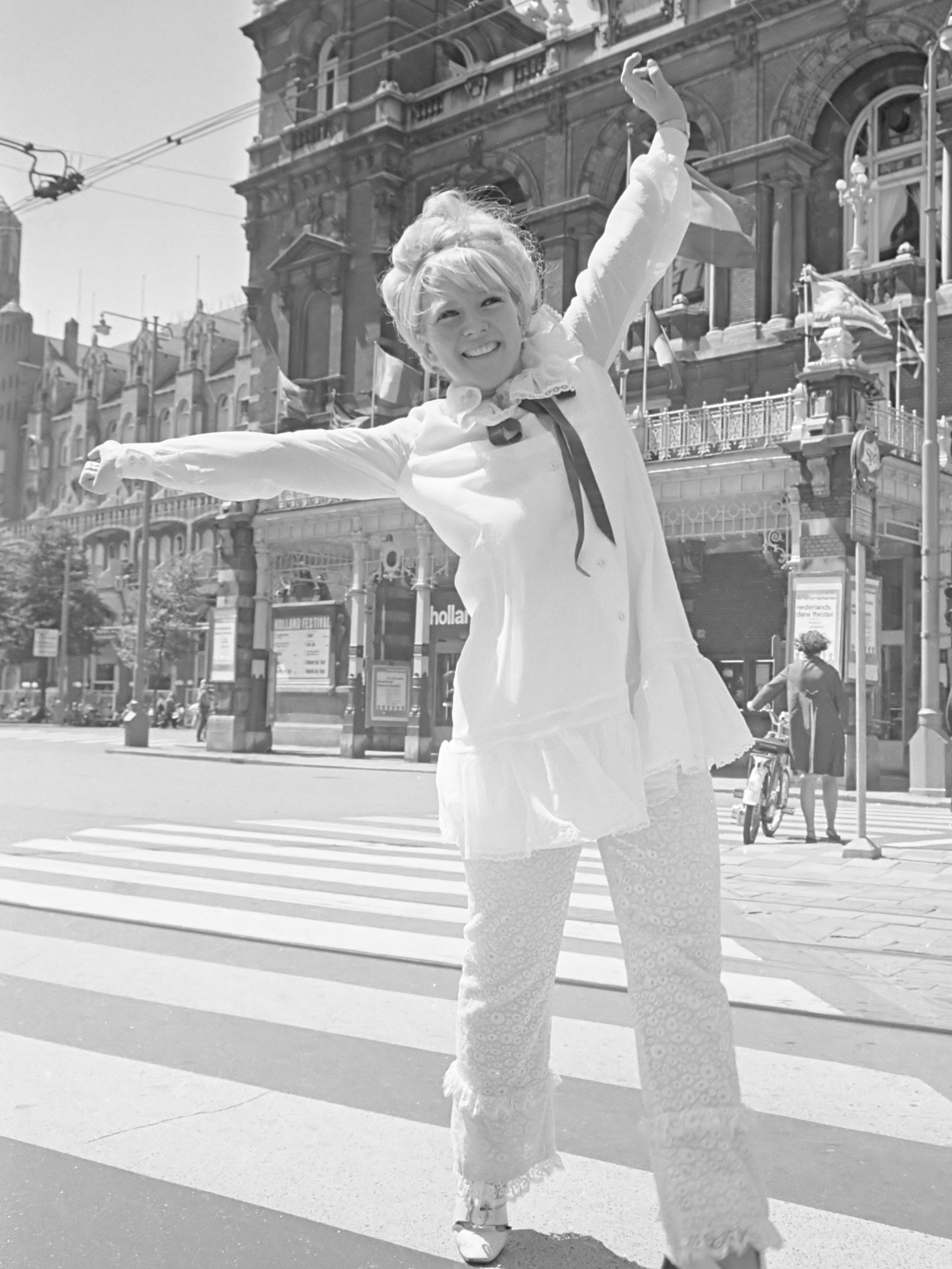 Aankomst filmster Julia Foster op Schiphol. Julia Foster midden op zebrapad op het Leidseplein Amsterdam 3 juli 1968